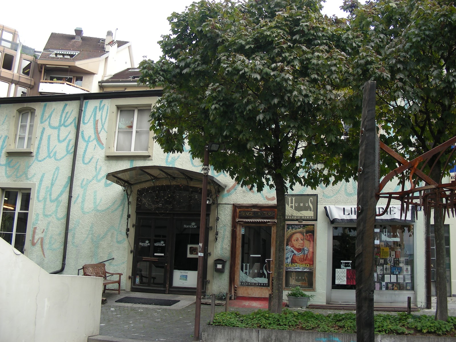 Entrée de la galerie Filambule